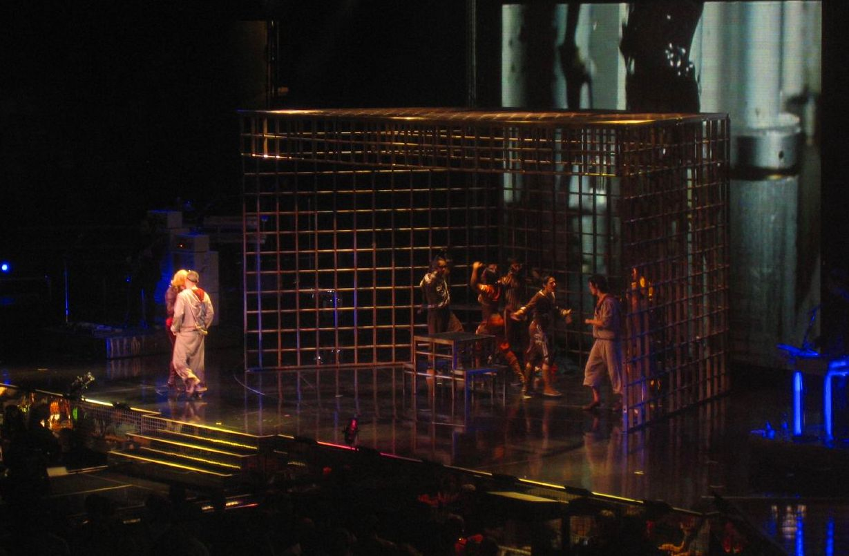 sorry